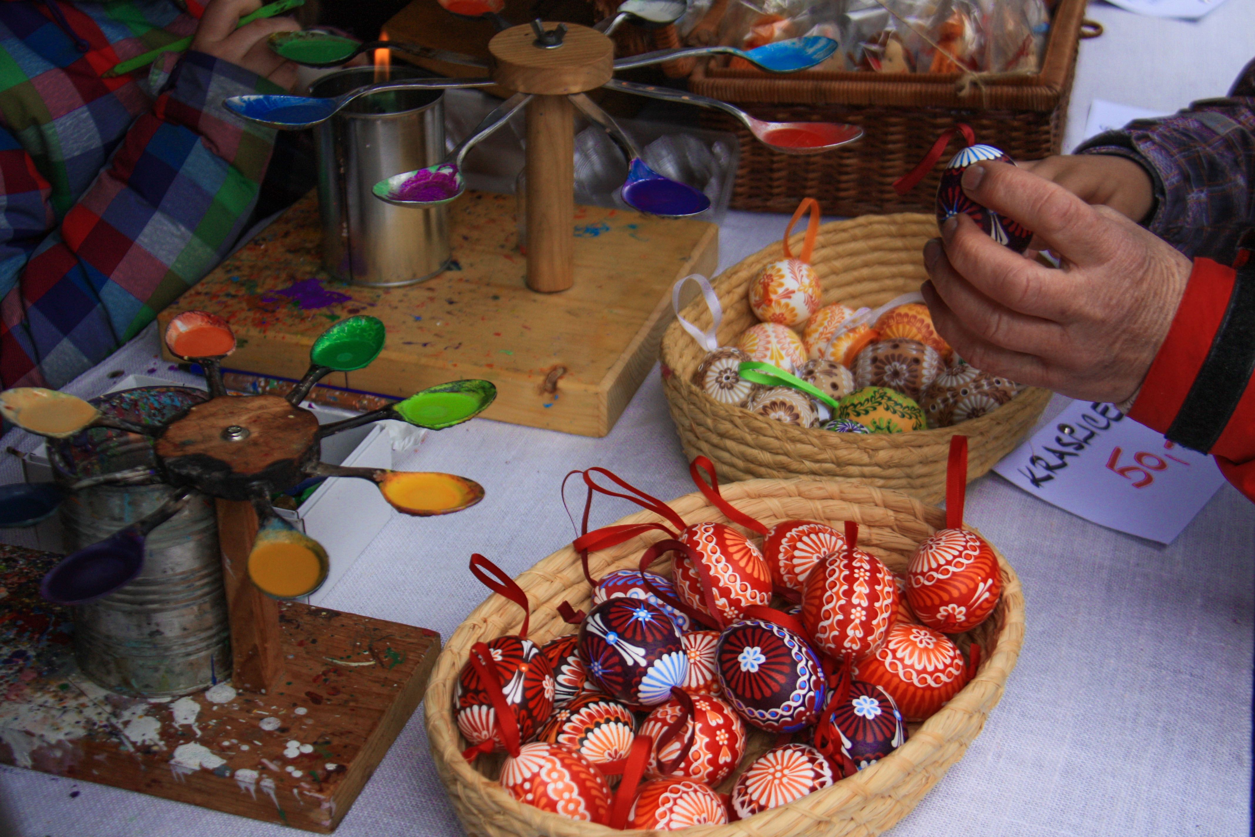 Oglądanie pisanek malowanych rozgrzanym, kolorowym woskiem podczas jarmarku wielkanocnego w Valašské muzeum v přírodě – skansen na Morawskiej Wołoszczyźnie znajdujący się w mieście Rožnov pod Radhoštěm.